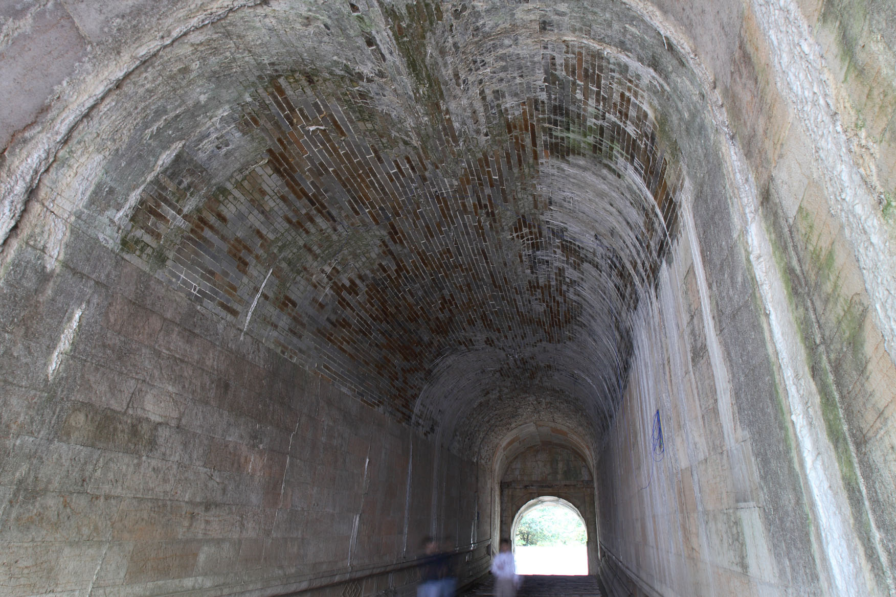 Ming Xiaoling Mausoleum; 明孝陵 at Nanjing